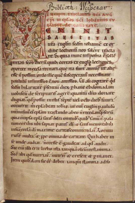 Handschrift Augustinus In epistulam Ioannis ad Parthos tractatus decem aus KLoster Weißenau, Houghton Library, MS Lat 213, fol. 1r (siehe auch Katalog)